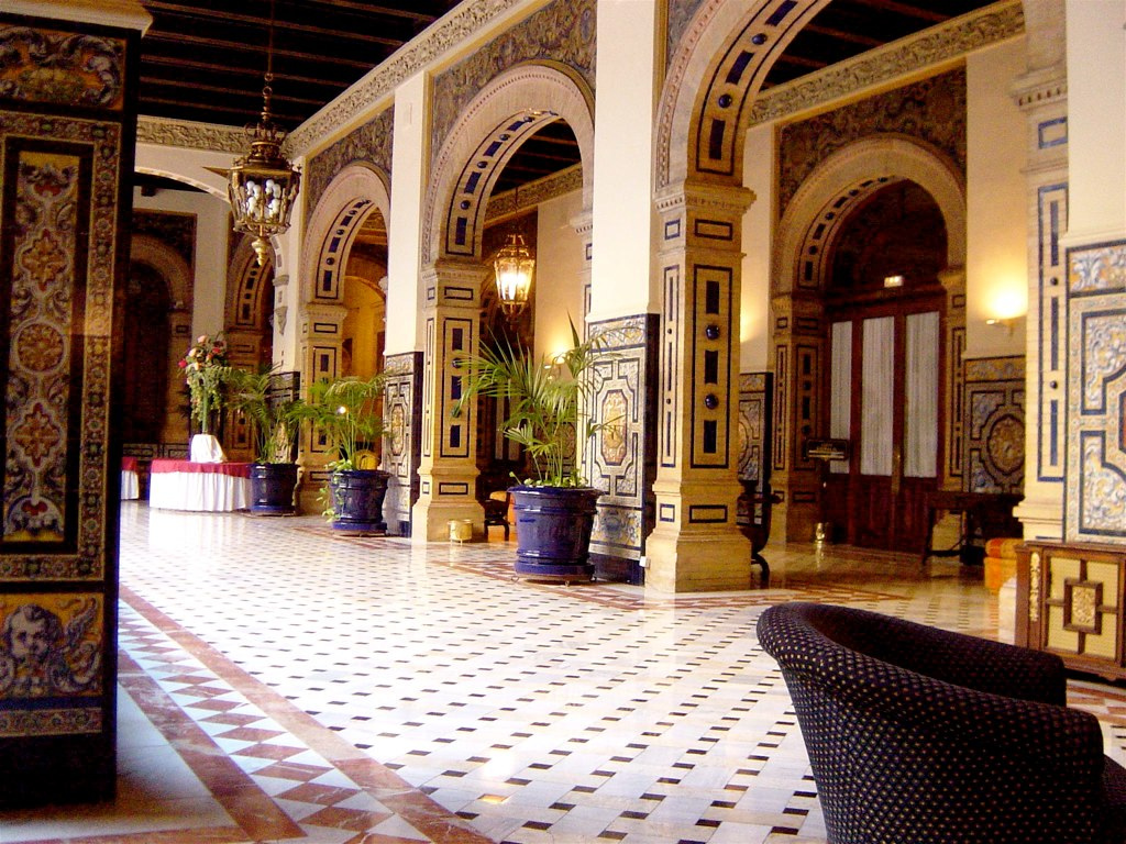 Hotel Alfonso XIII, Sevilla